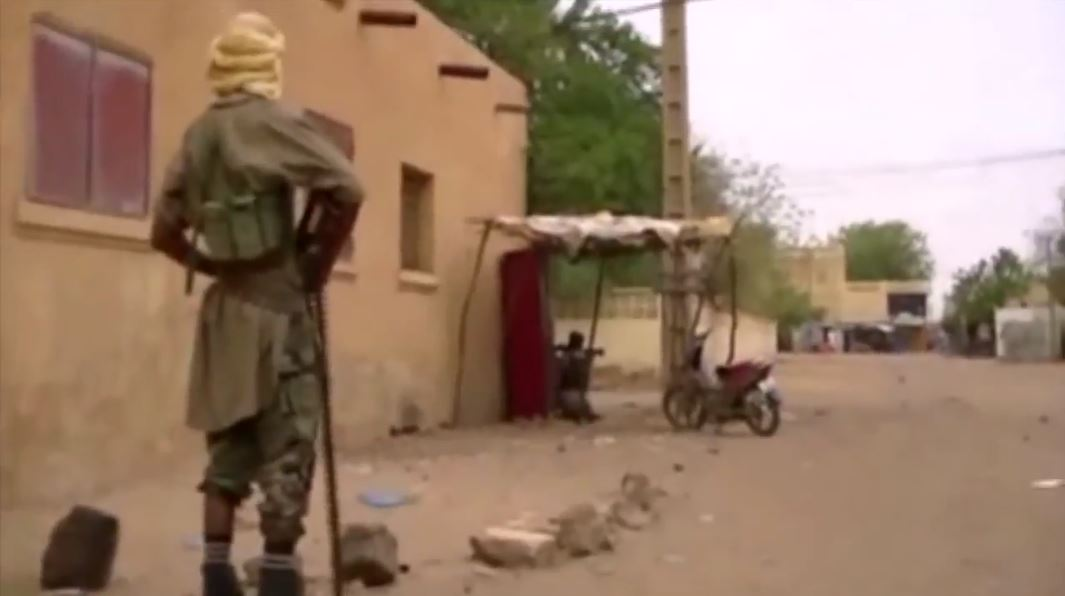 Djihadistes lors des combats à Gao, au Mali, contre le MNLA en juin 2012.